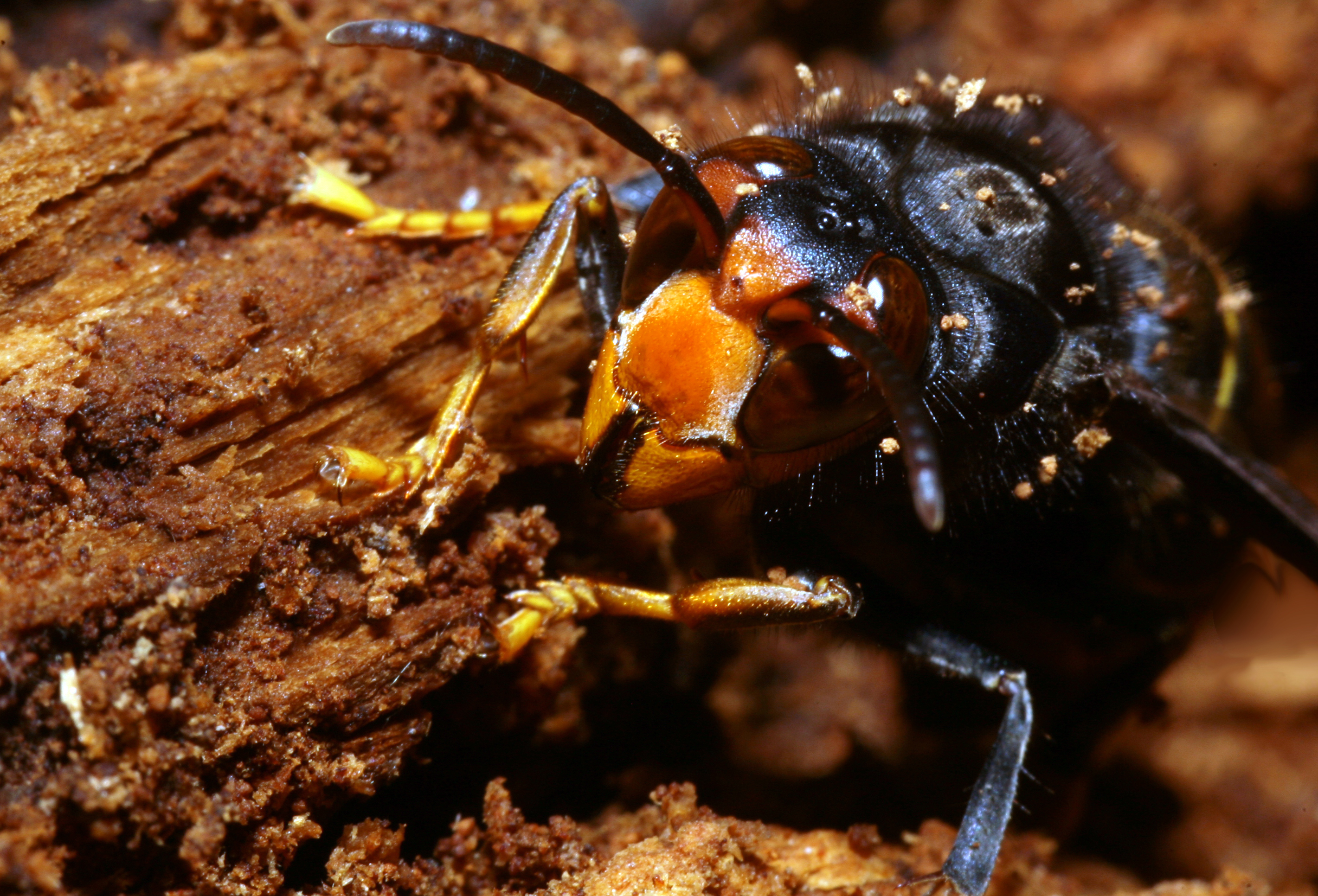 Frelon asiatique caché dans de l'écorce de bois au mois de février 2020 près de Montpellier